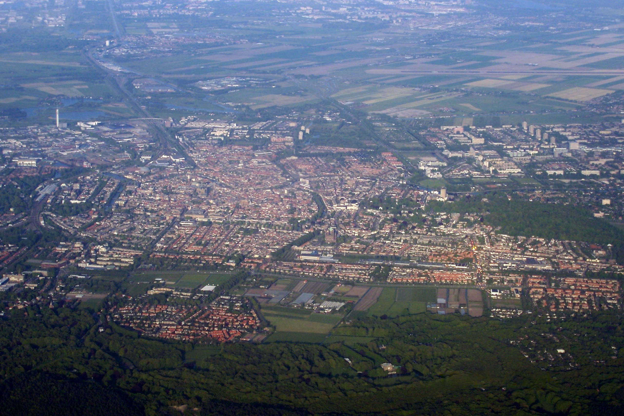 Haarlem Haarlem categorie:afbeelding Haarlem